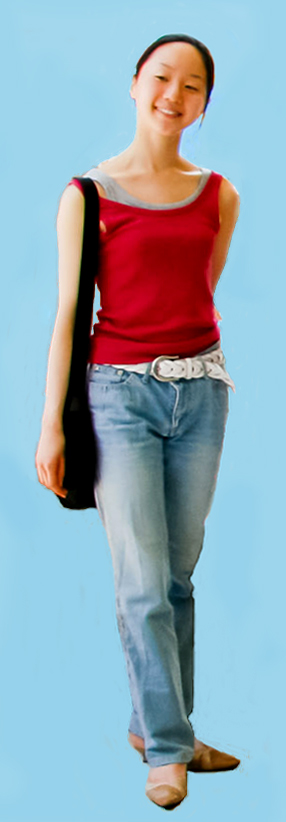 USA国際バレエコンクール2006年の受賞者記念写真における米沢唯。